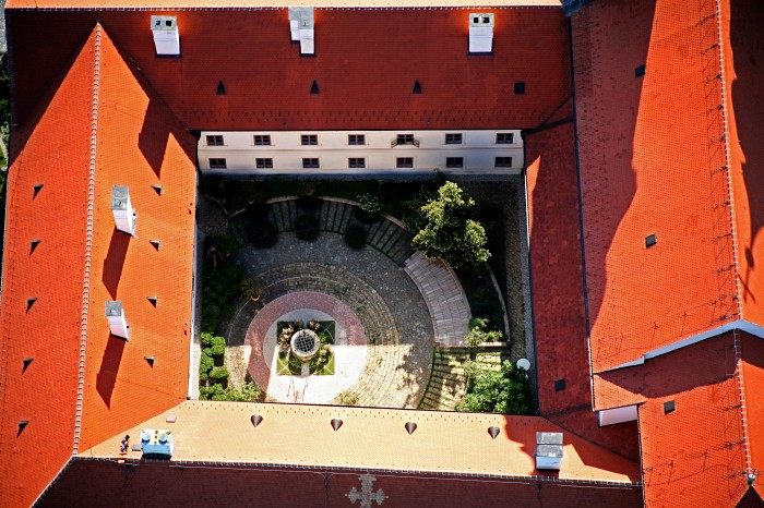 Légifotó a Tihanyi Apátságtól